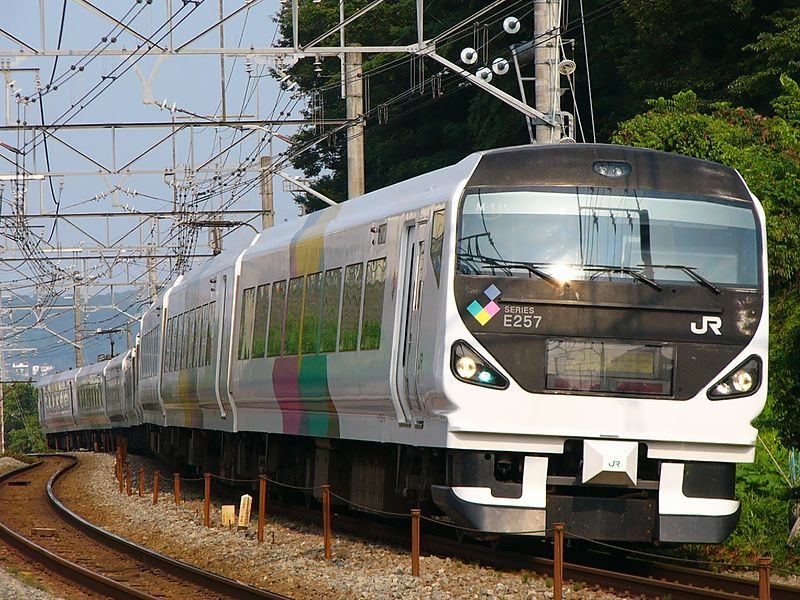 中央本線を走るJR東日本E257系電車（豊田駅～八王子駅）